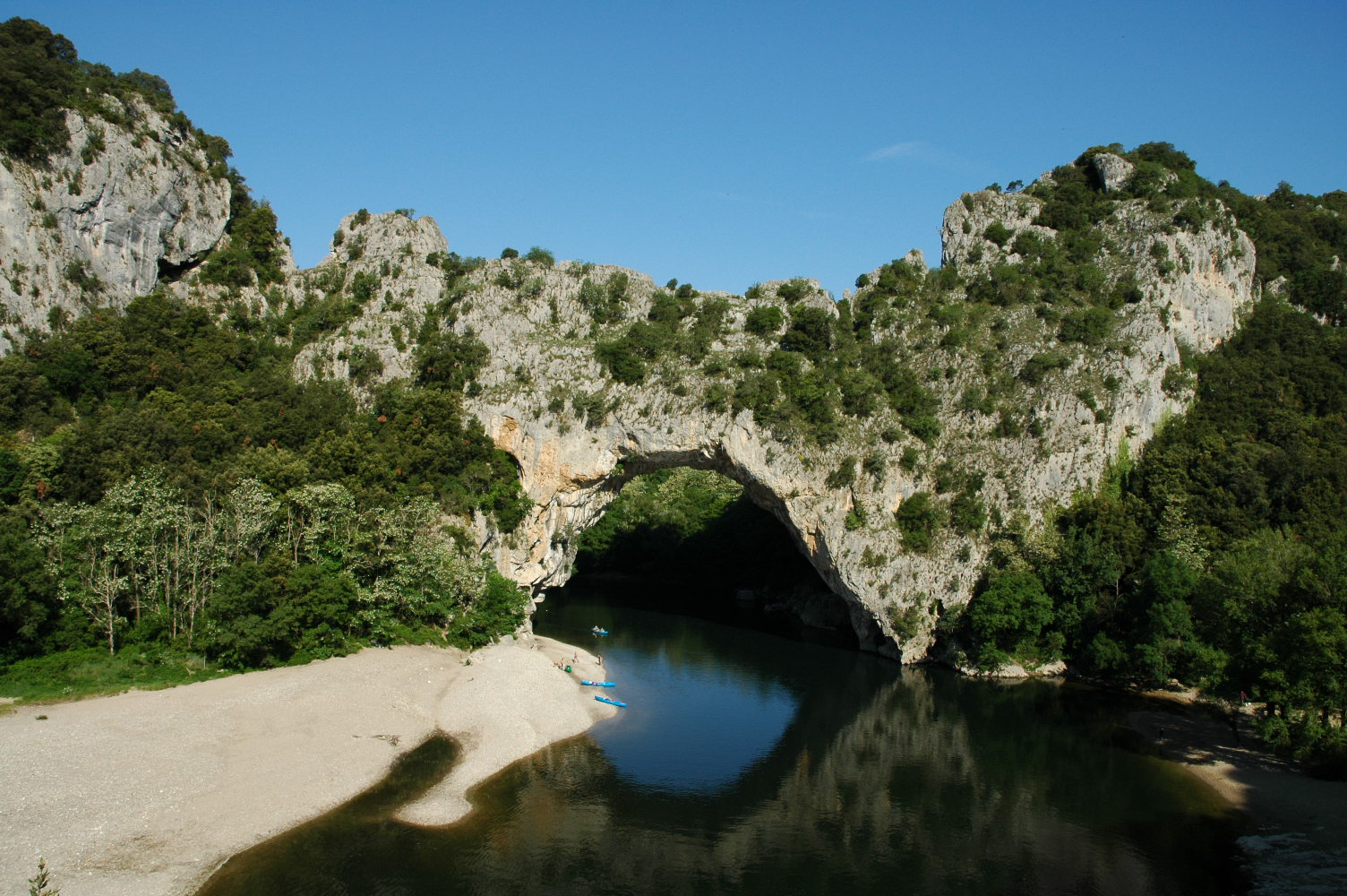 Le Pont d'Arc en Ardèche, début des gorges de l'Ardèche. commune de Vallon-Pont-d'Arc. Photo prise par pour le site en mai 2005. photographie personnelle, si vous voulez utiliser cette image, merci d'en indiquer la source.